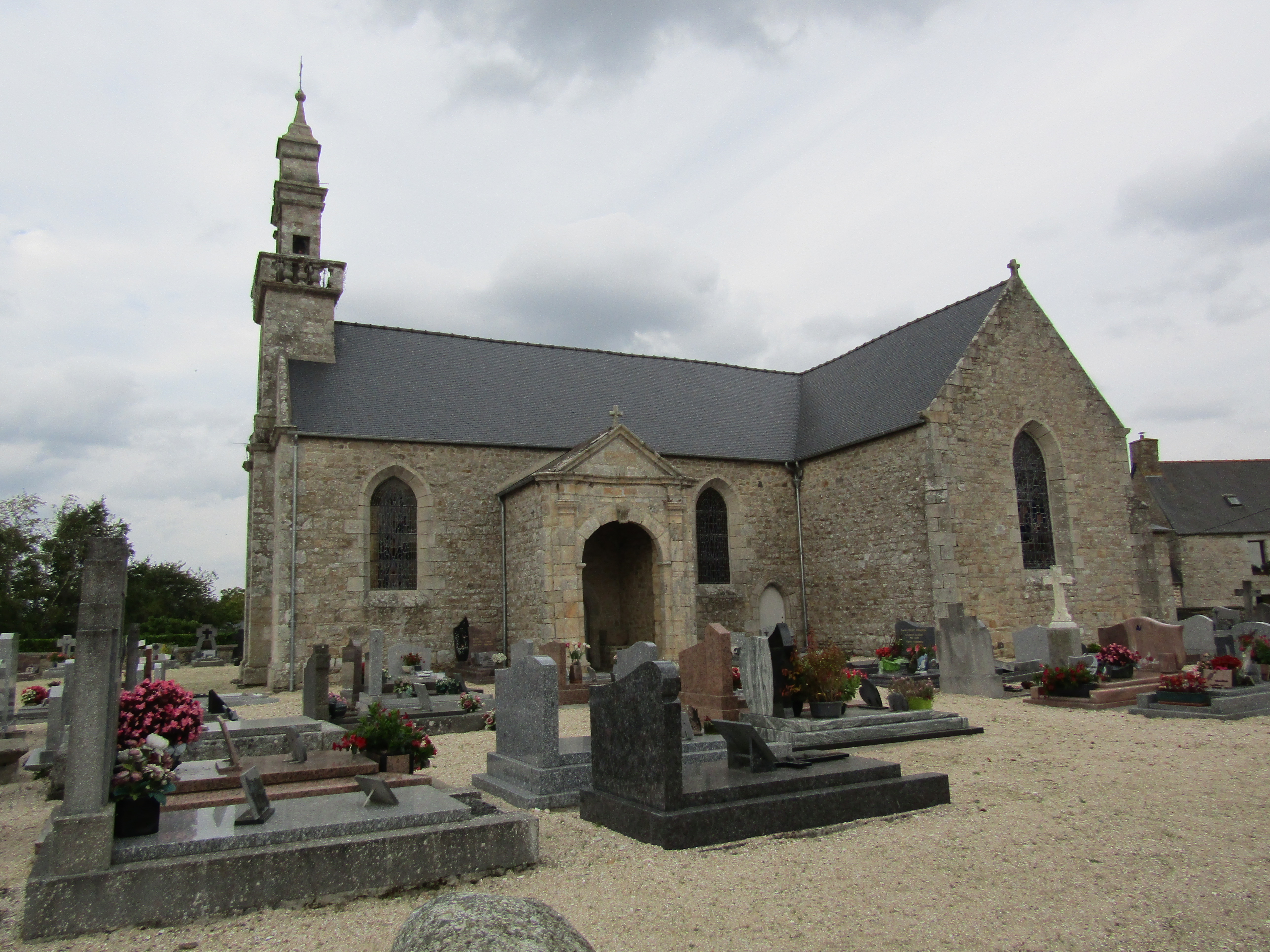 Eglise Notre-Dame de Trégonneau